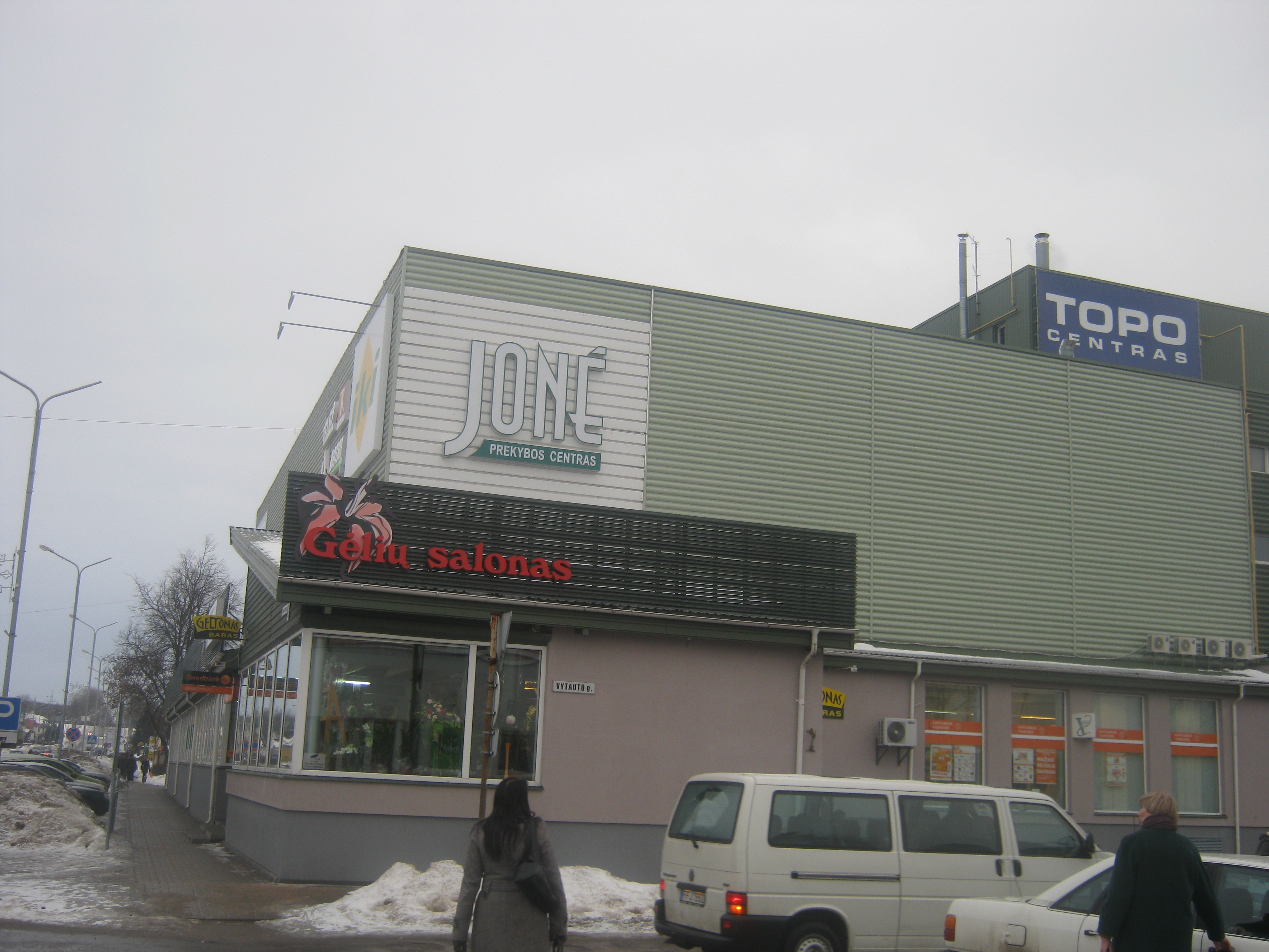 prekybos centras Jonė